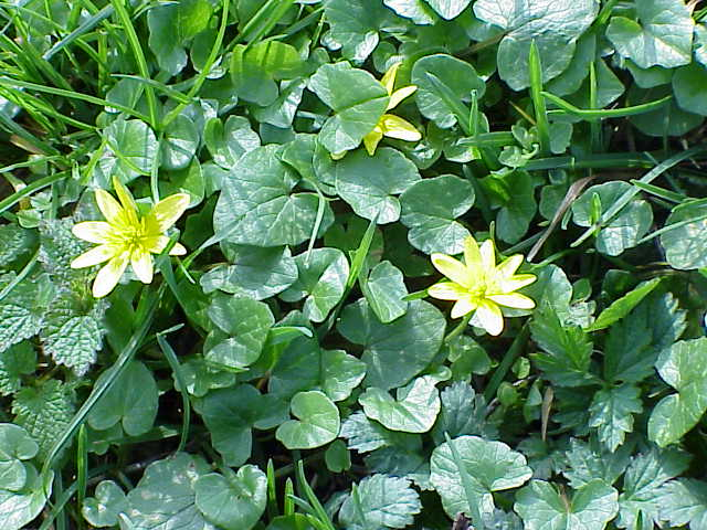 Species: Ranunculus ficaria Family: Ranunculaceae Image No. 3